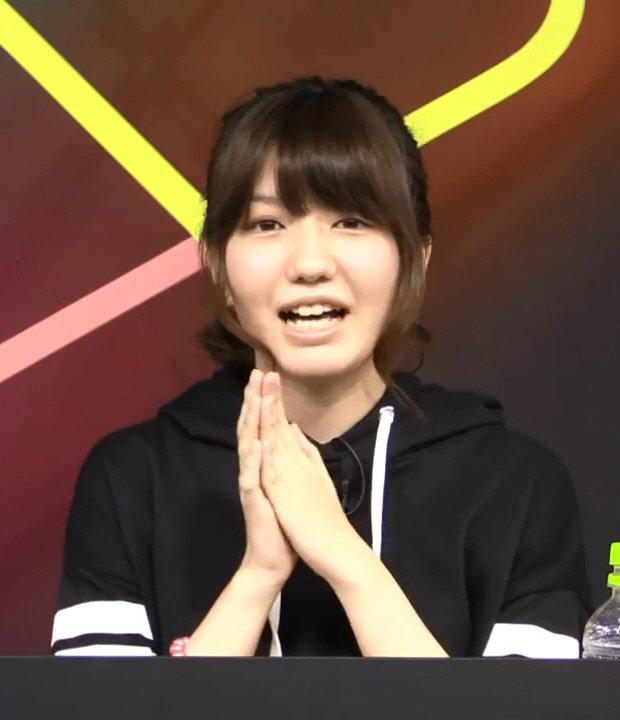 【GAMEFEST 2016夏＃45】声優三人でデレステチャレンジ！